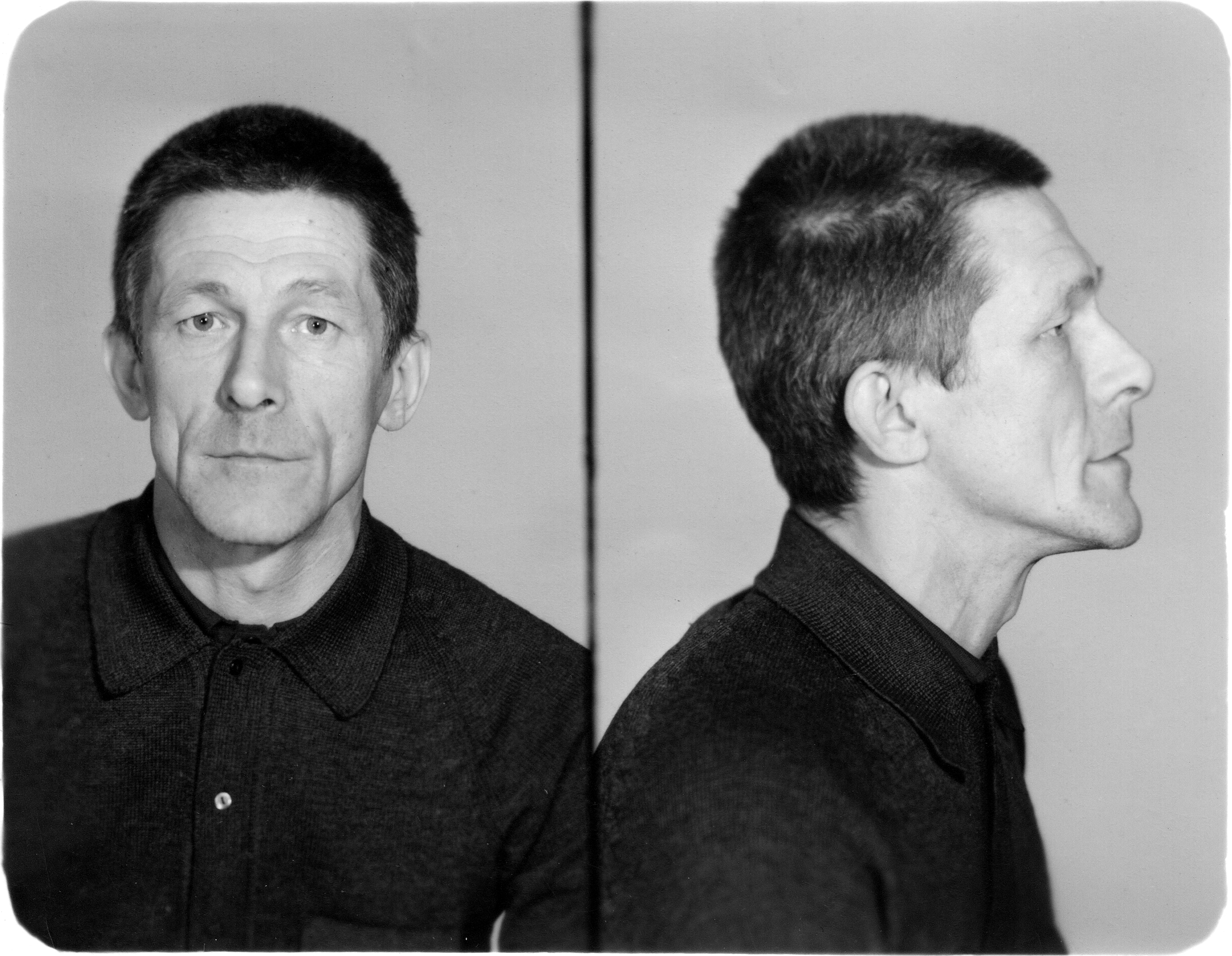 Георгий Павлович Хомизури. МВД (КГБ) АрмянскойССР. Фото выдано при освобождении по Указу Президиума Верховного Совета СССР от 10 февраля 1987 года.